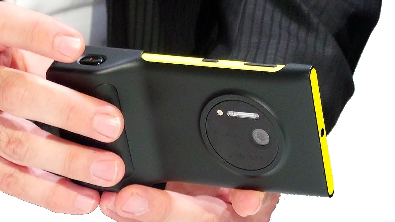 中文（香港）: Nokia Lumia 1020 with PD-95G